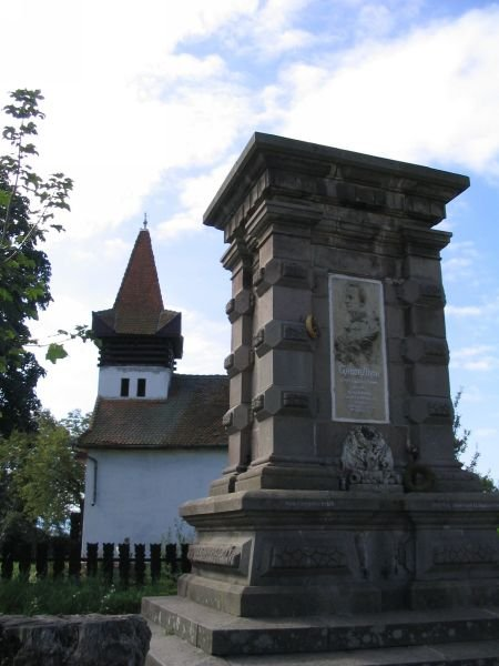 Gábor Áron síremléke, háttérben az eresztevényi református templom.